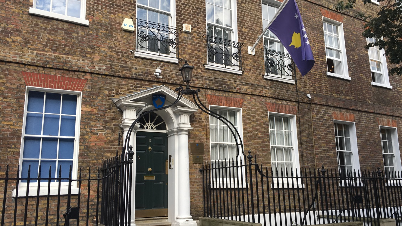 Kosovarische Botschaft im Vereinigten Königreich